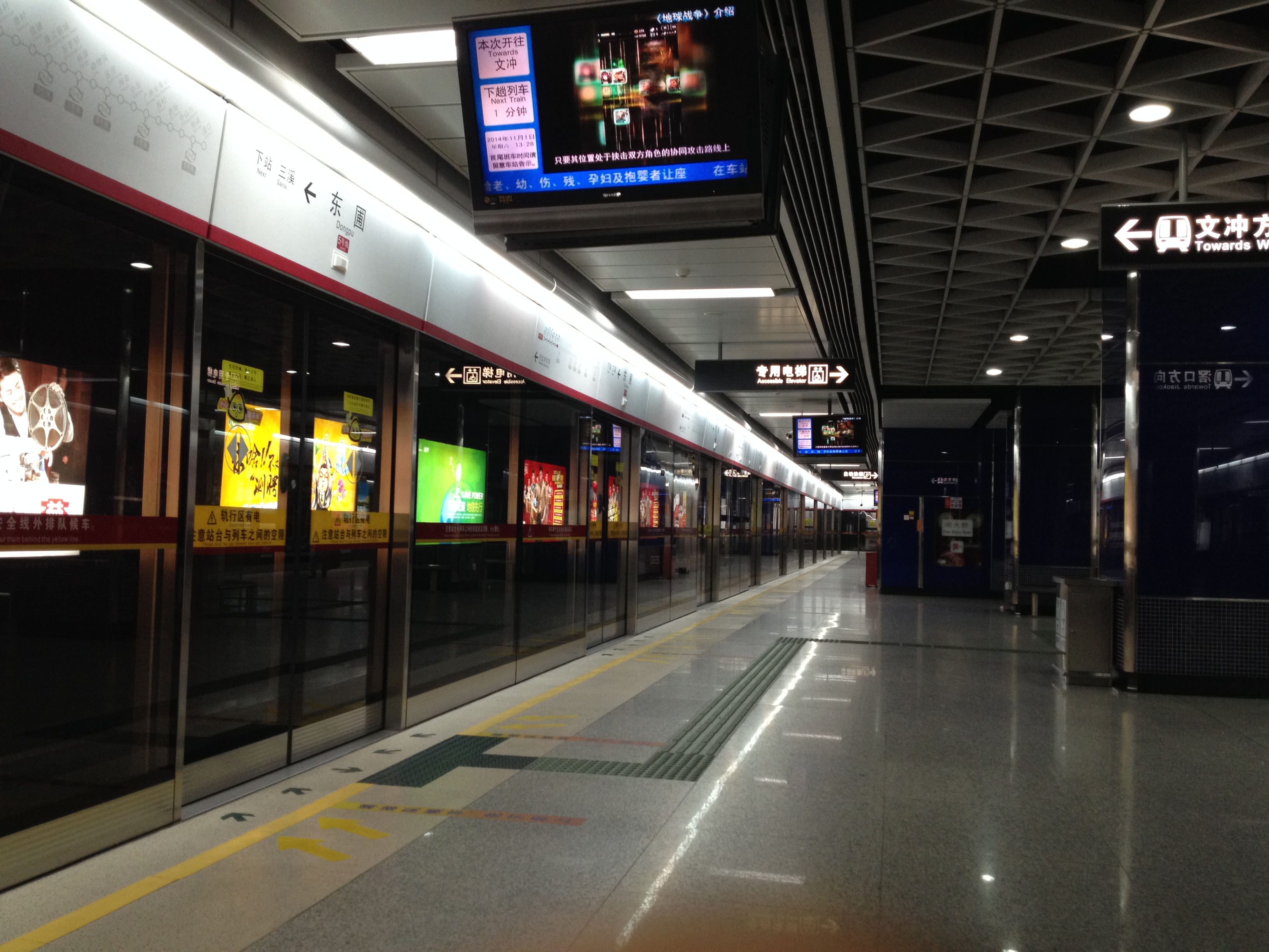 广州地铁东圃站月台（文冲方向）